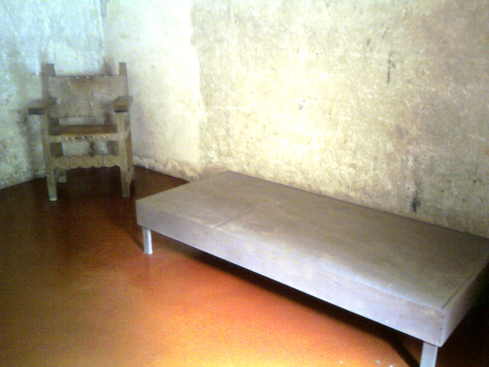 Habitaciones en el Templo y exconvento de San Nicolás de Tolentino (Actopan).